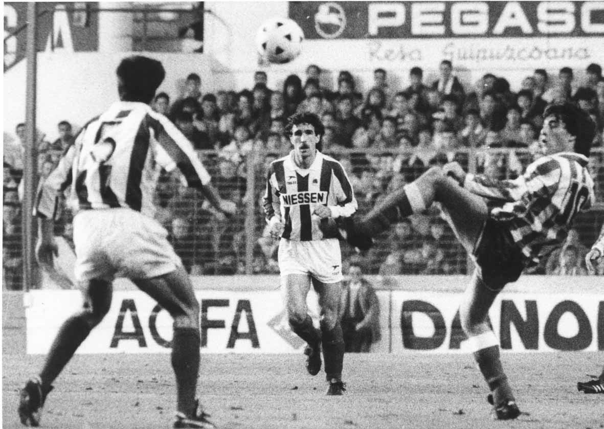 Jesus Mari Zamora eta Paulo Futre Niessen izeneko elastiko esponsoreoarekin jolas-lanzean